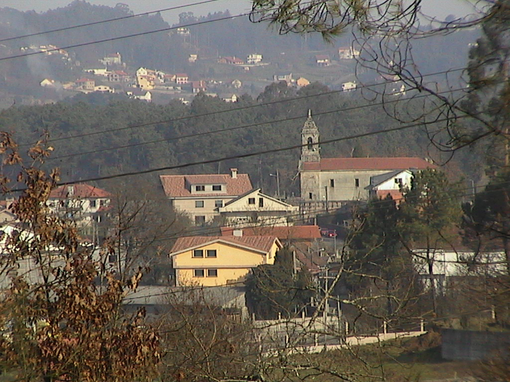 Barrio da Iglesia, en Torroso